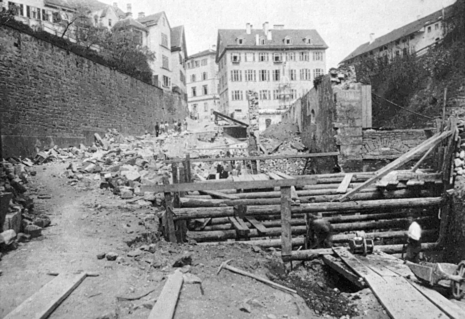 Abrissarbeiten an einer Mühle beim Bau der Mühlstraße in Tübingen